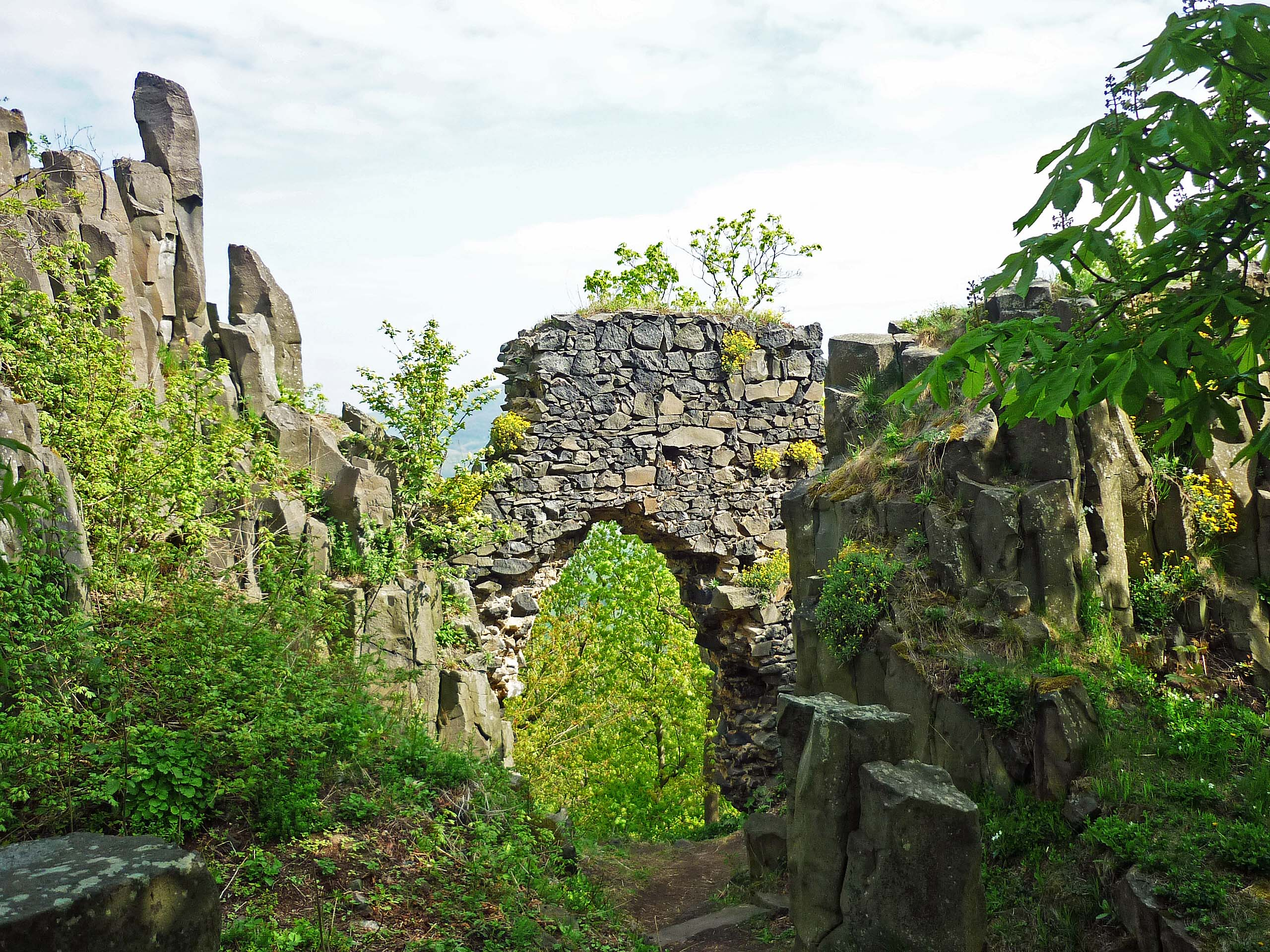 Burgruine Wostrey (Hrad Ostrý) im Böhmischen Mittelgebirge